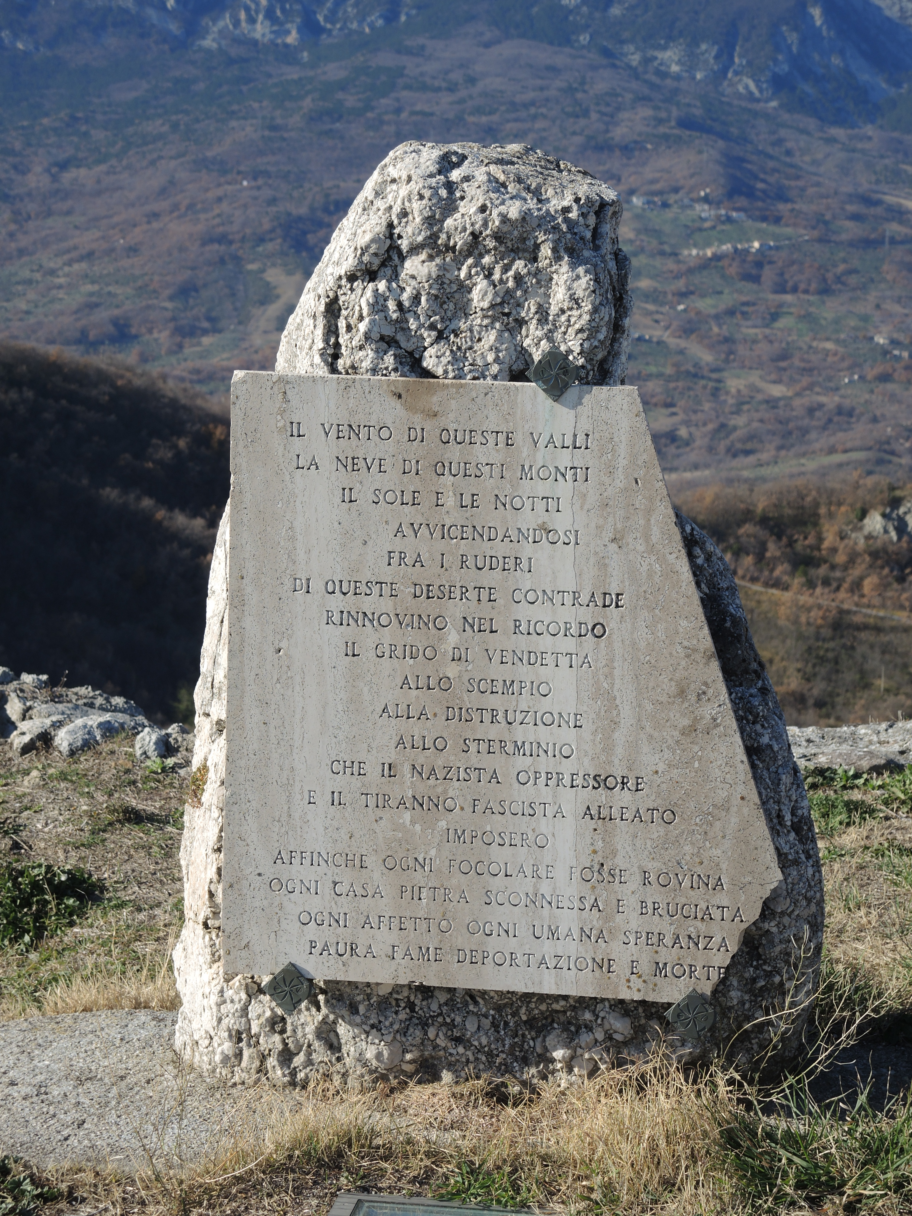 Gessopalena